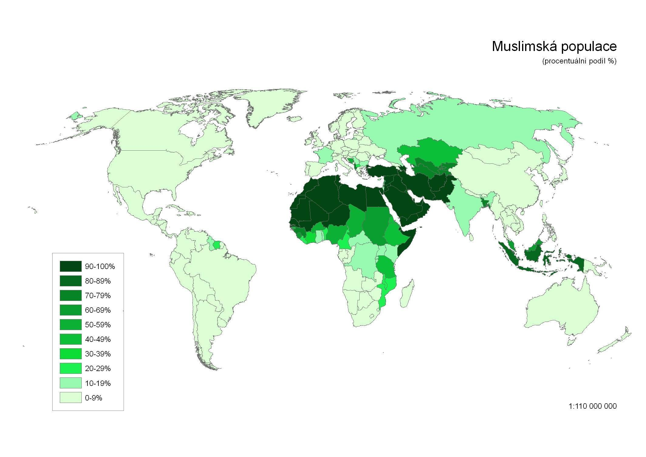 Muslimská populace ve světě (procentuální zastoupení)